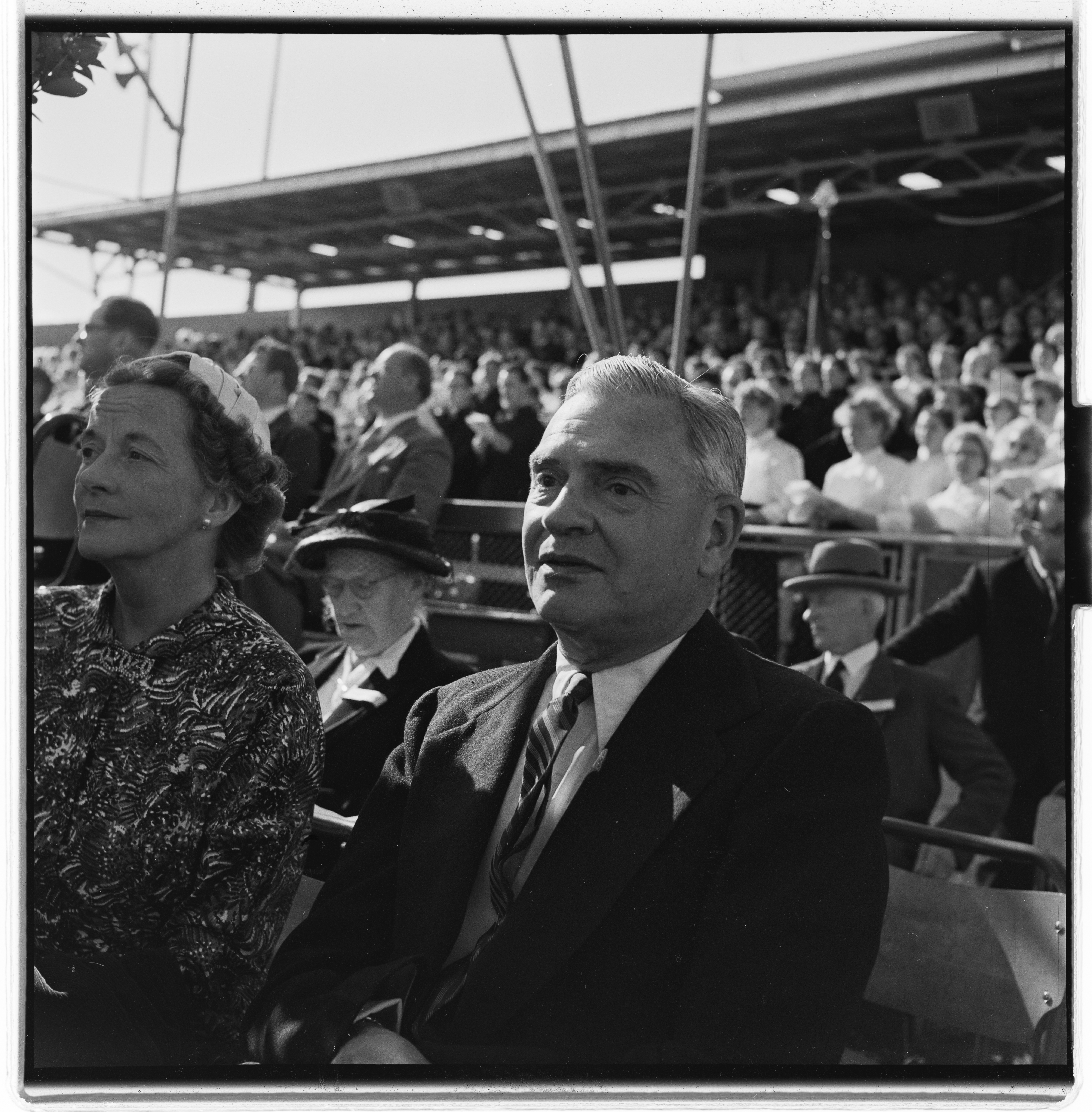 Bildet er hentet fra Arkivverket. Billy Graham Arkivinstitusjon : Riksarkivet Arkivnavn : Billedbladet NÅ Sted : Norge, Oslo, Oslo, Ullevål stadion Emneord: kristendom, forkynnelse, møter Avbildet